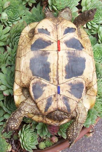 Suture Testudo hermanni boettgeri